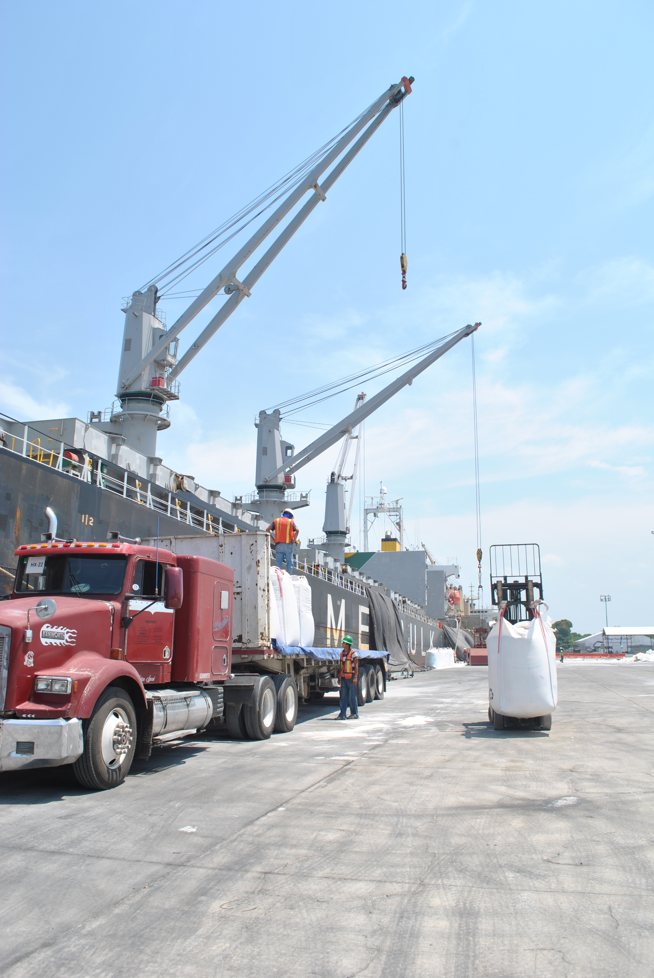 Terminal de Usos Múltiples, Exportación de Azúcar en Puerto Chiapas